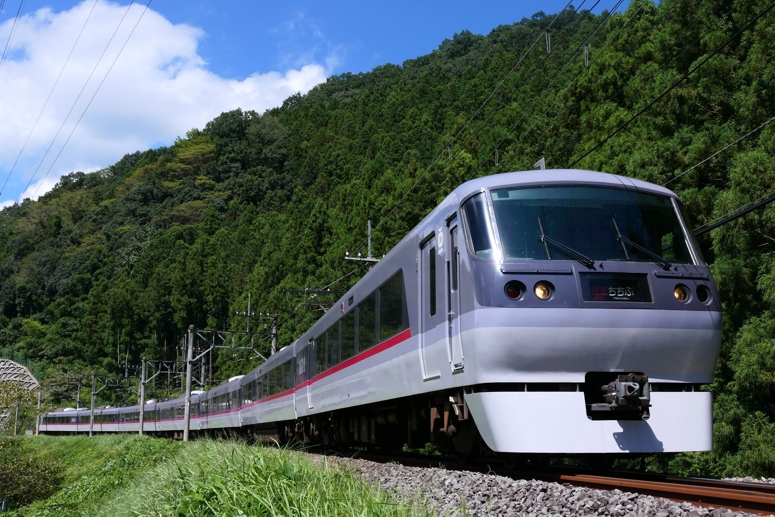 西武10000系レッドアローちちぶ号。東 (ひがし)吾 (あが)野 (の) - 吾 (あが)野 (の)駅間にて。